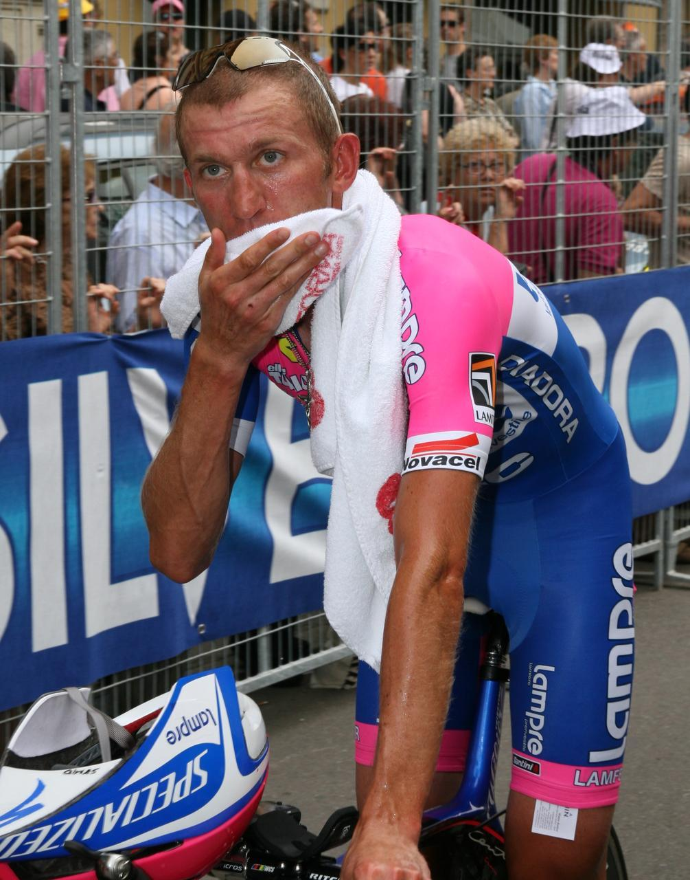 Sylvester Szmyd